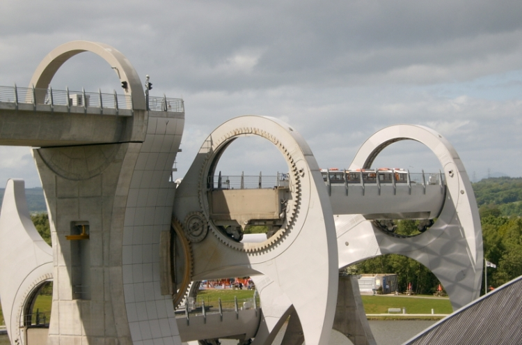 Boat lift Falkirk wheel beim Hochheben eines Bootes